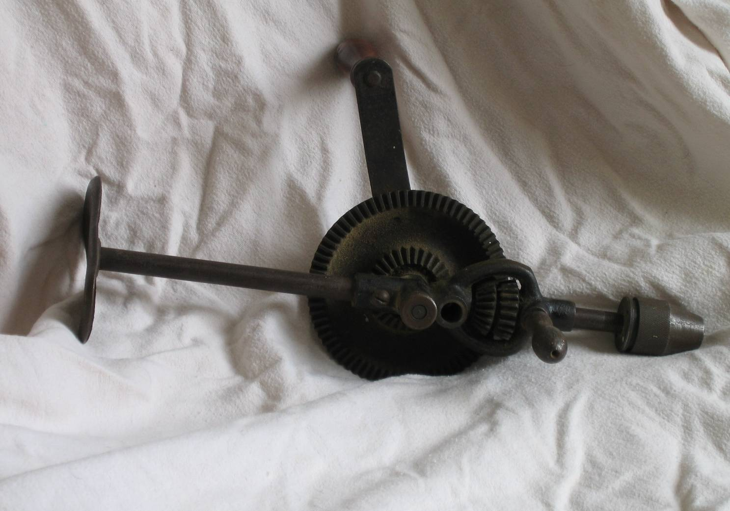 A manual drill